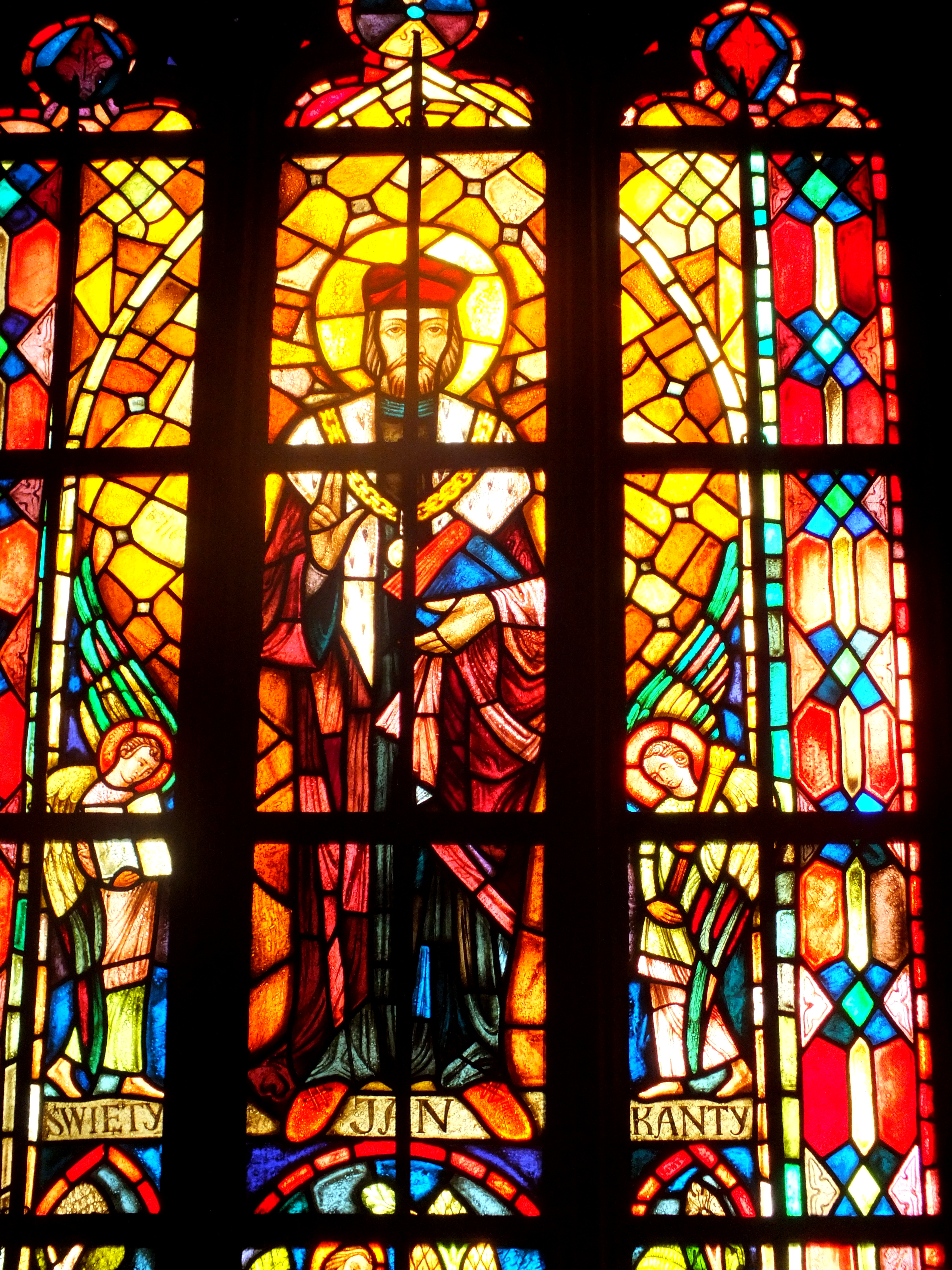 Witraż św. Jana Kantego w archikatedrze św. Jana Chrzciciela we Wrocławiu